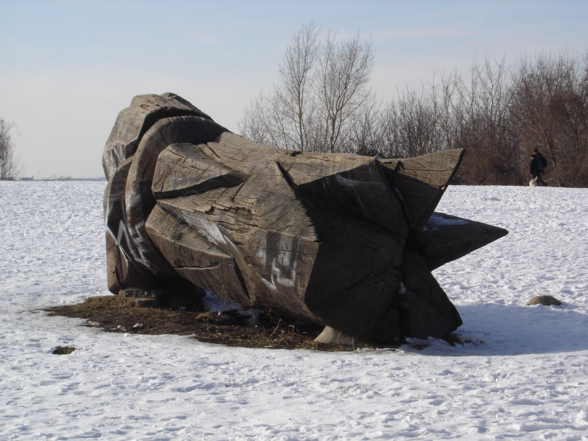 Holzskulptur auf dem Fockeberg in Leipzig